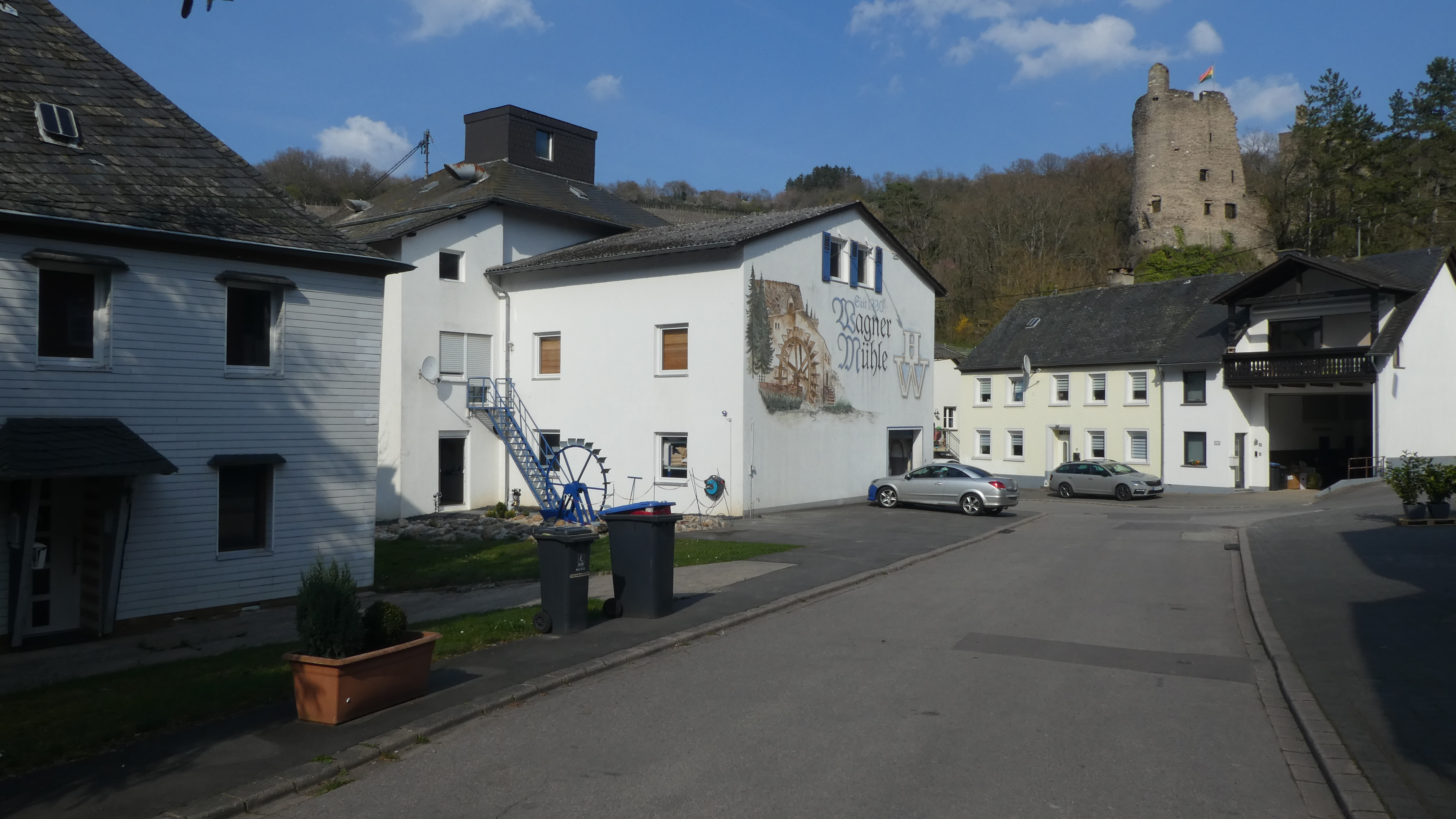 Westwand der Ruine aus dem Ort gesehen. In der Mitte des Bildes ist die Wagnermühle zu sehen.